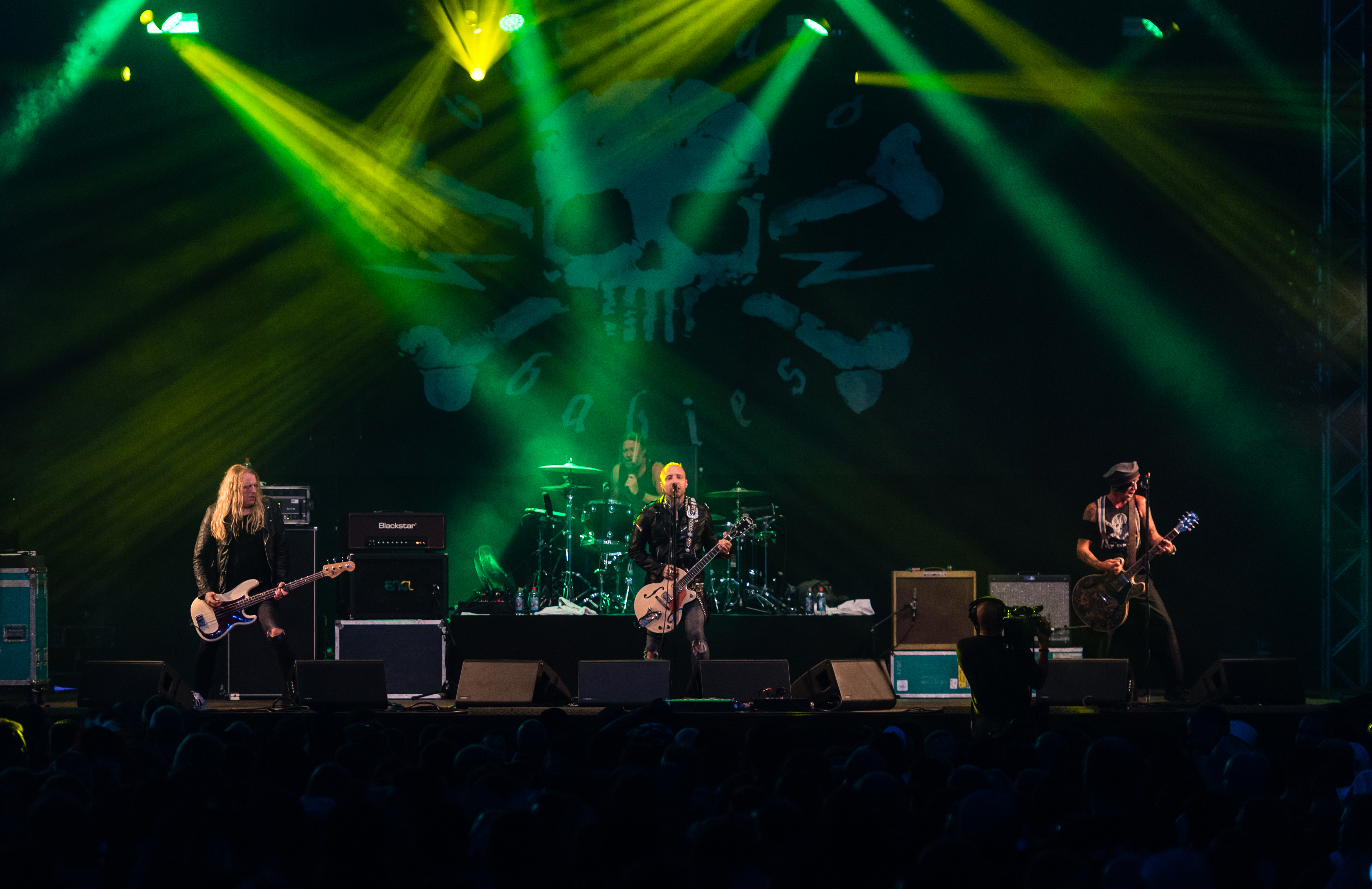 Backyard Babies beim Wacken Open Air 2018